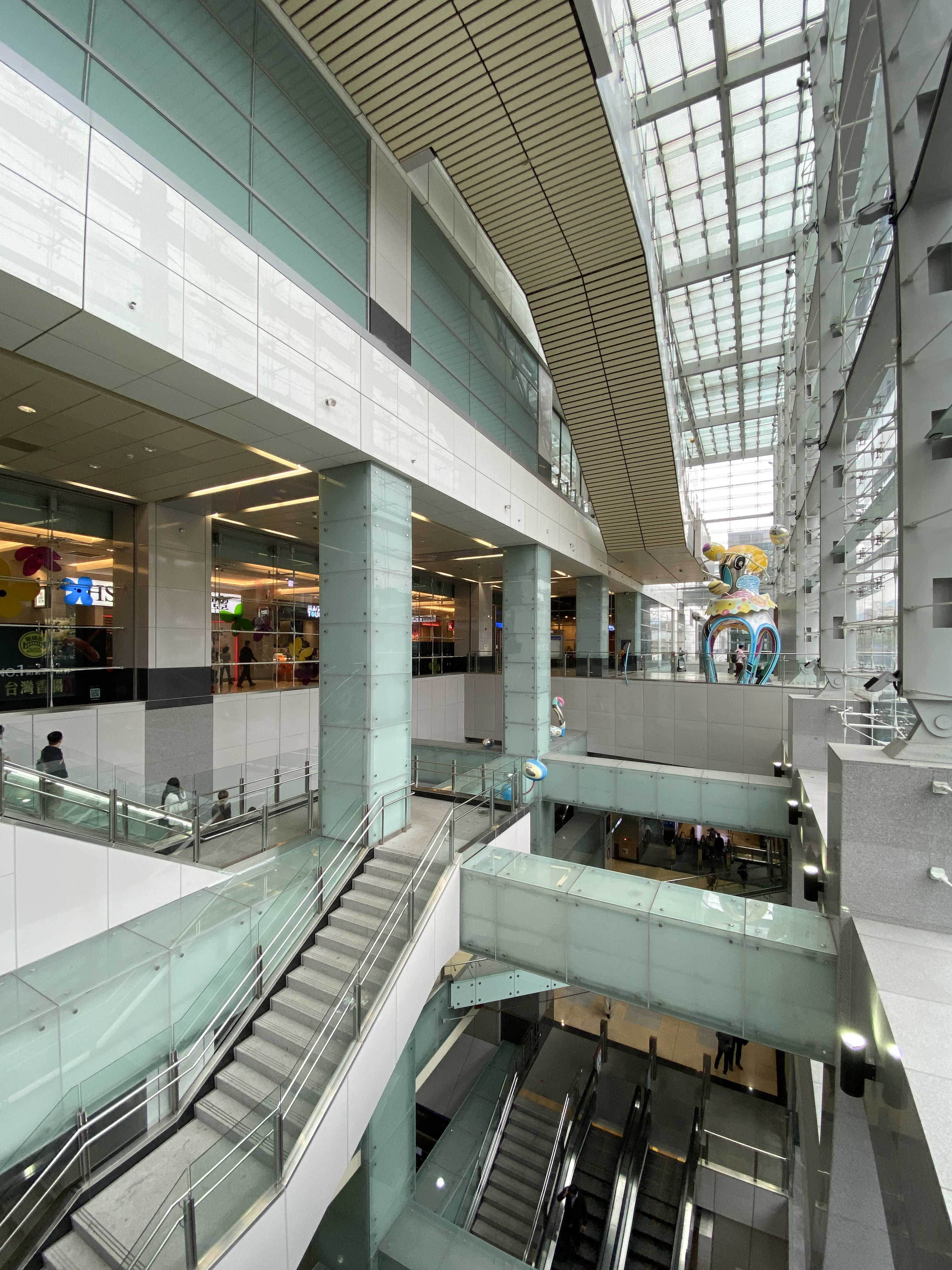 Nangang Station Atrium